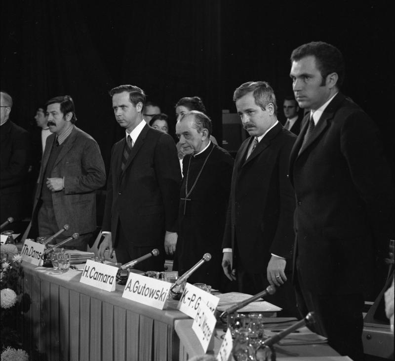 Erste Sitzung des Deutschen Forums für Entwicklungspolitik in der Bonner Beethovenhalle (Gäste: Erzbischof Camara und Bundespräsident Heinemann)